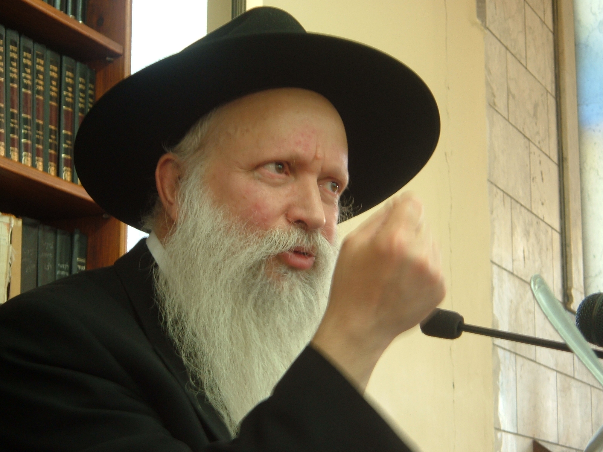 rabi_ginsburg